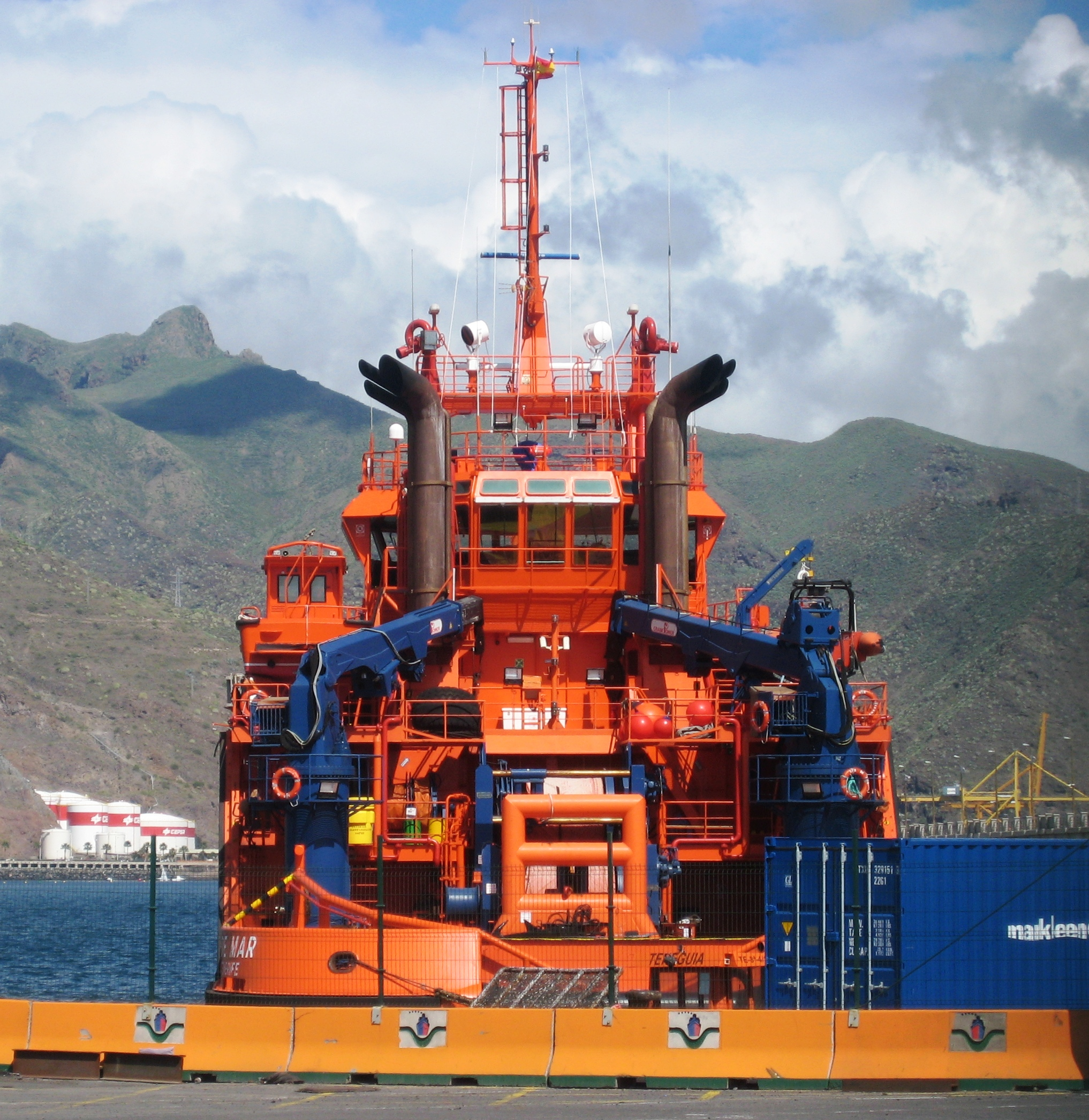 SASEMAR 1 "Luz de Mar" IMO Number: 9320104 MMSI Number: 224311000 Callsign: ECIJ Length: 56 m Beam: 15 m